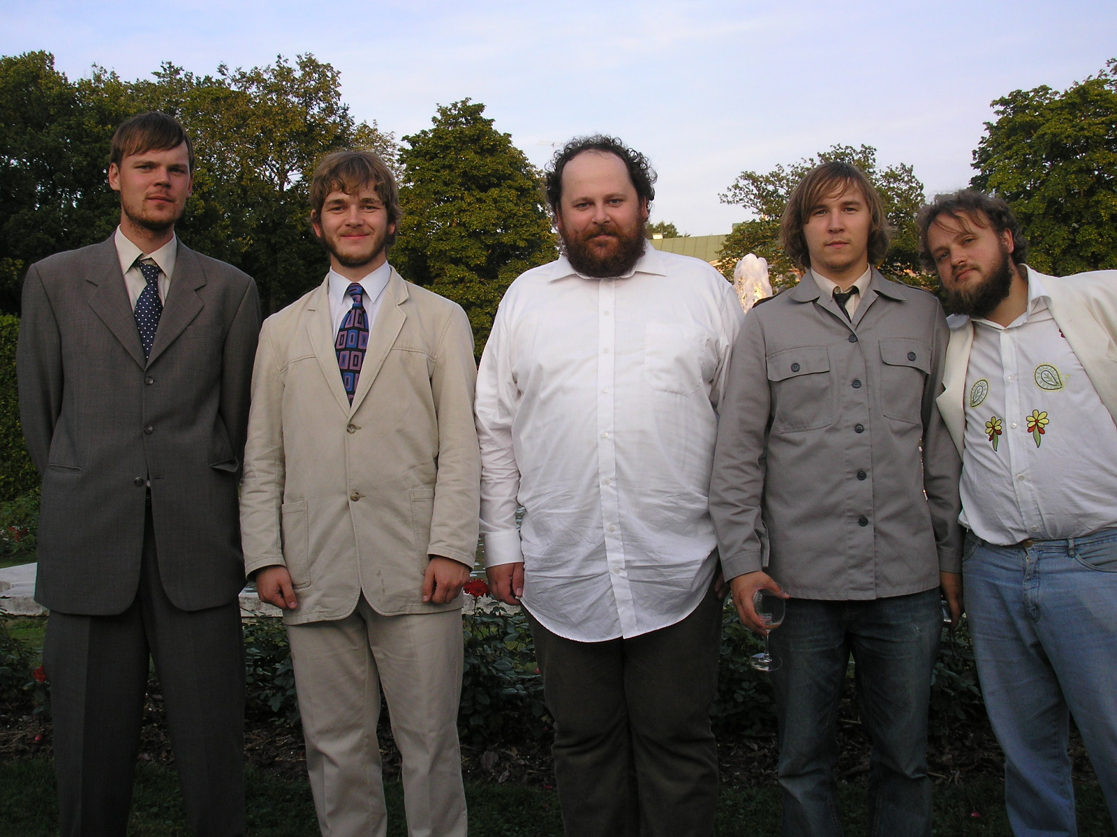 Ansambel Köök presidendilossi Roosiaias 20. augustil 2007, pärast esinemist kultuurinimeste vastuvõtul. Pildil vasakult: Huns (ansamblist Shelton San), Madis "Tursk" Aesma (Ans. Andur), Jaan Pehk, Foto (Ans. Andur), Tauno (Stella). Foto: tundmatu väike poiss